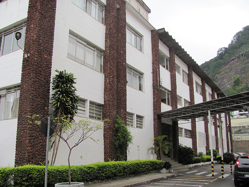 Campus Academia CESJF